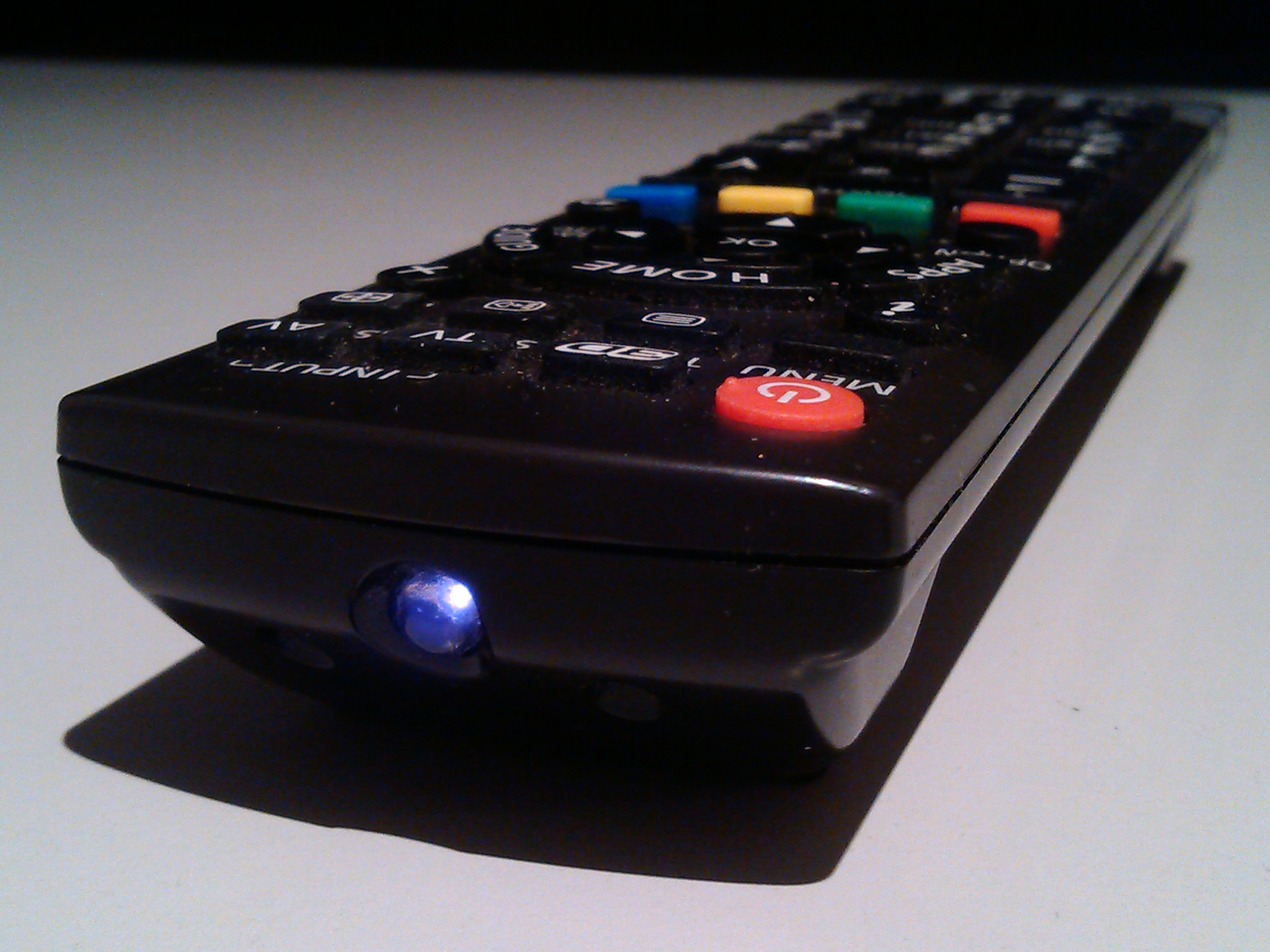 Comandament a distància emitint llum infraroja (940 nm)